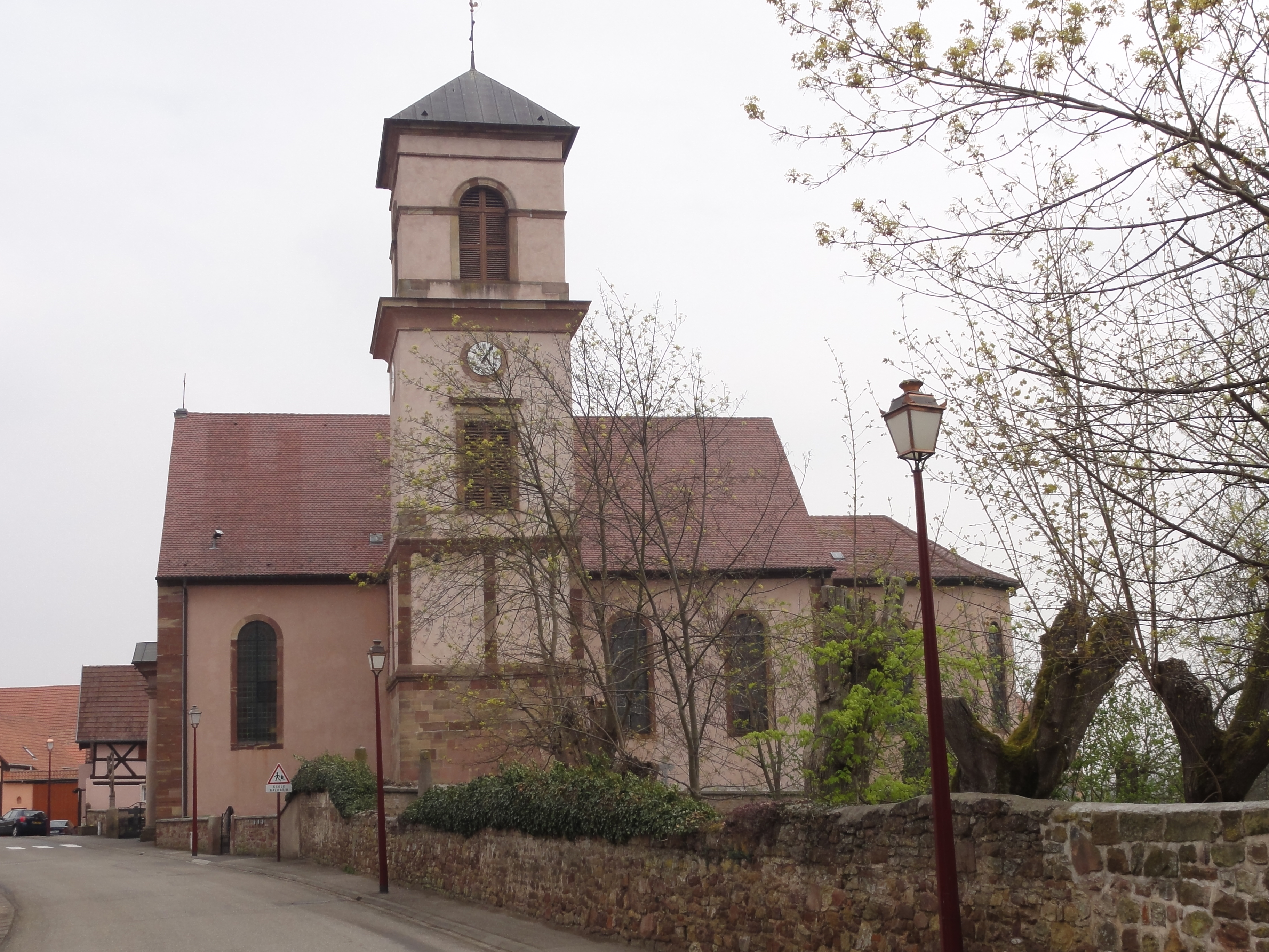 Alsace, Bas-Rhin, Osthoffen, Église catholique Saint-Jacques le Majeur: .